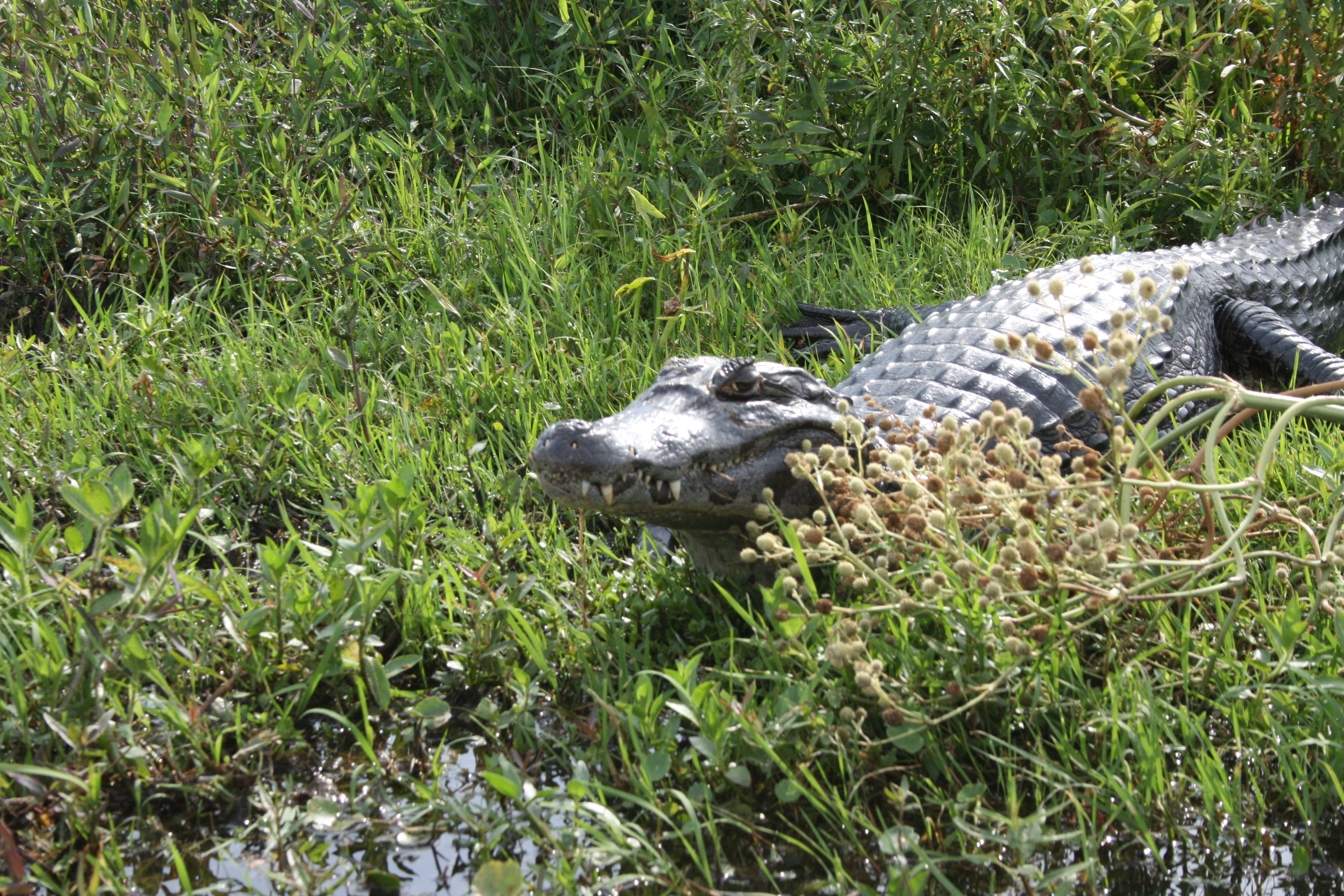 Yacaré in Argentina, Corrientes.